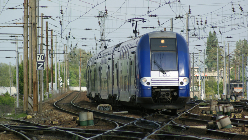 Z26553-554 (427) du TER Picardie venant de Paris-Nord arrive en gare d'Amiens